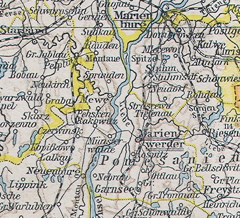 Kreis Marienwerder bis 1920, Ausschnitt aus File:Ost-_und_Westpreussen.jpg